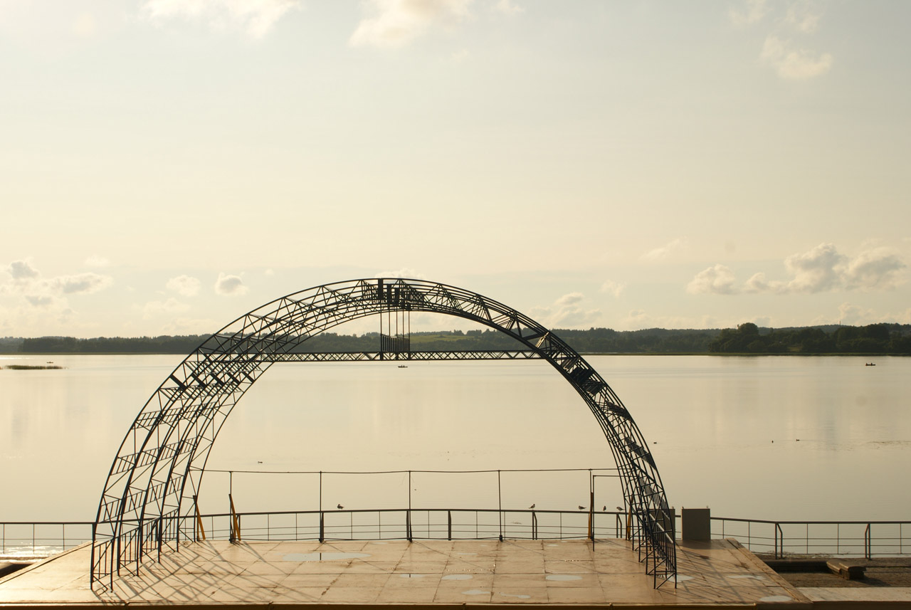 Miastra Lake, Minsk Voblast, BY